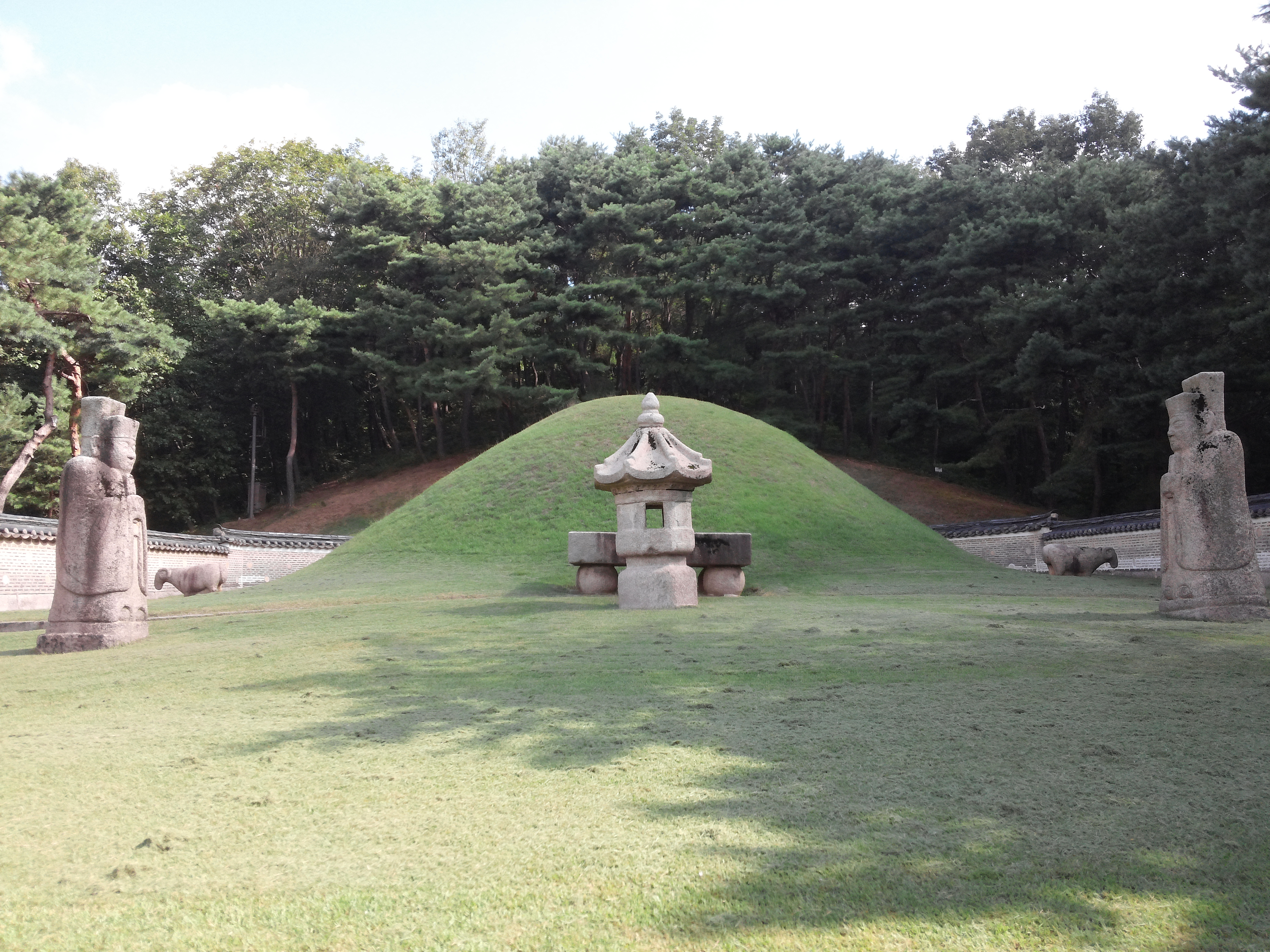 경릉(敬陵) 의경세자(덕종) 봉분 및 석물.